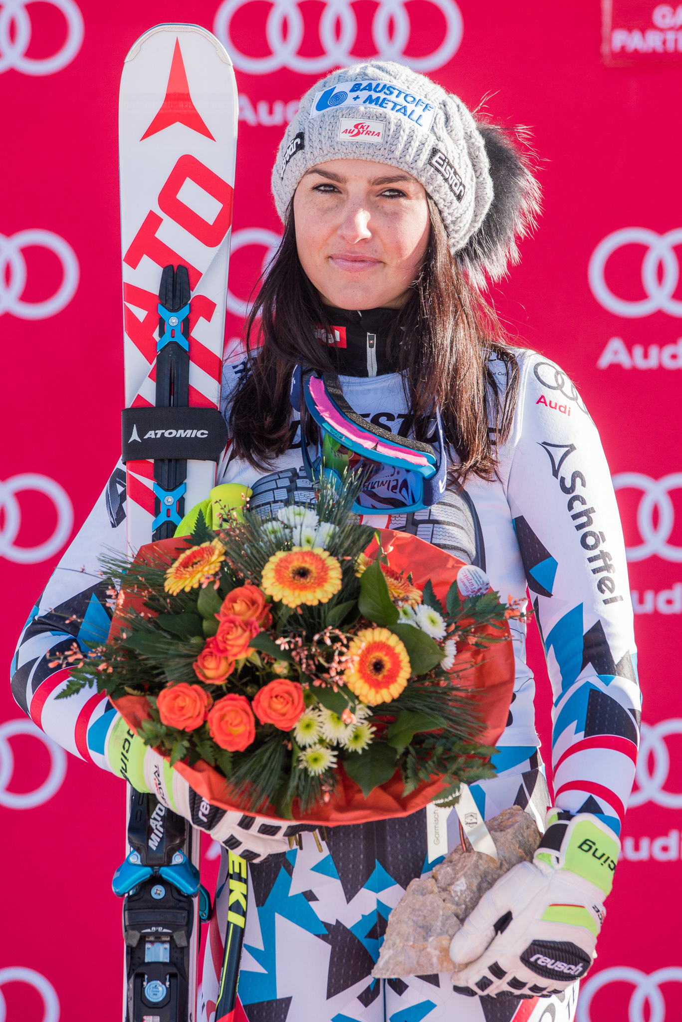 64. Kandahar Rennen,Audi FIS Ski Weltcup Garmisch-Partenkirchen,Damen Super-G,Kandahar,Ladies Super-G,Stephanie Venier